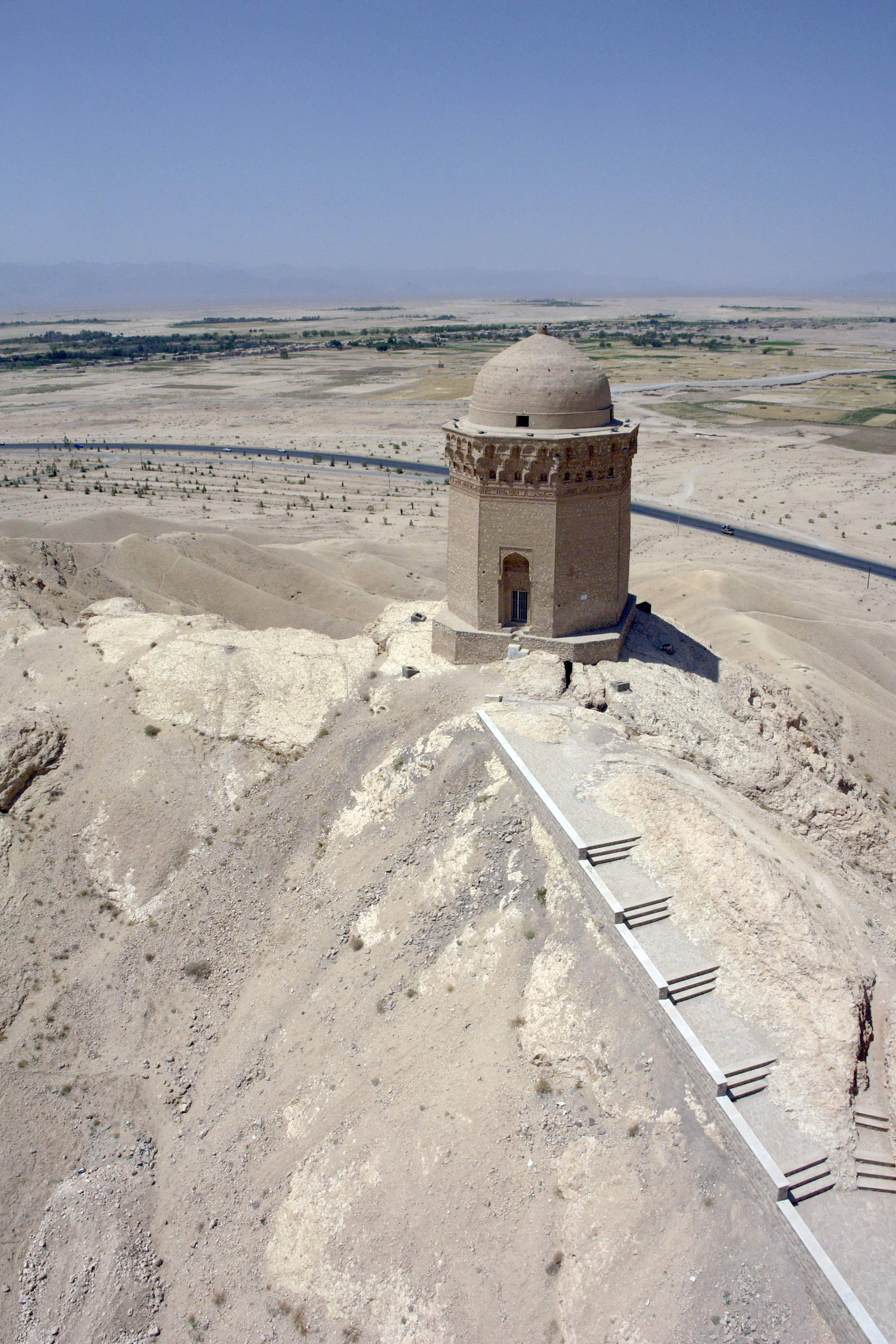 گنبد علی یا (عالی)